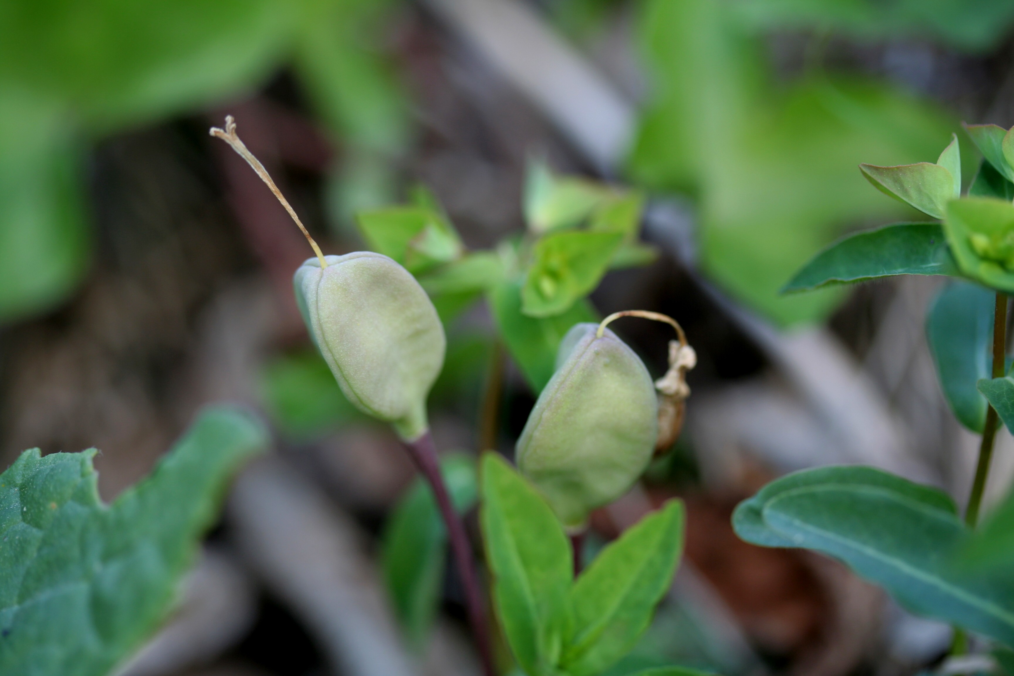 Erythronium_dens-canis (Dente di Cane) Località : Villiago, Sedico (BL), 387 m s.l.m.